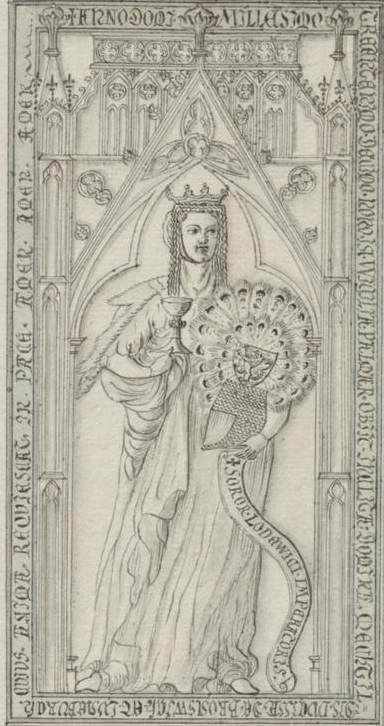 Grafik aus dem Klebeband Nr. 16 („Leichbegängnisse“) der Fürstlich Waldeckschen Hofbibliothek Arolsen Motiv: Grabplatten der Eheleute Mathilde von Bayern († 1319) und Otto II. von Braunschweig, der Strenge († 1330)